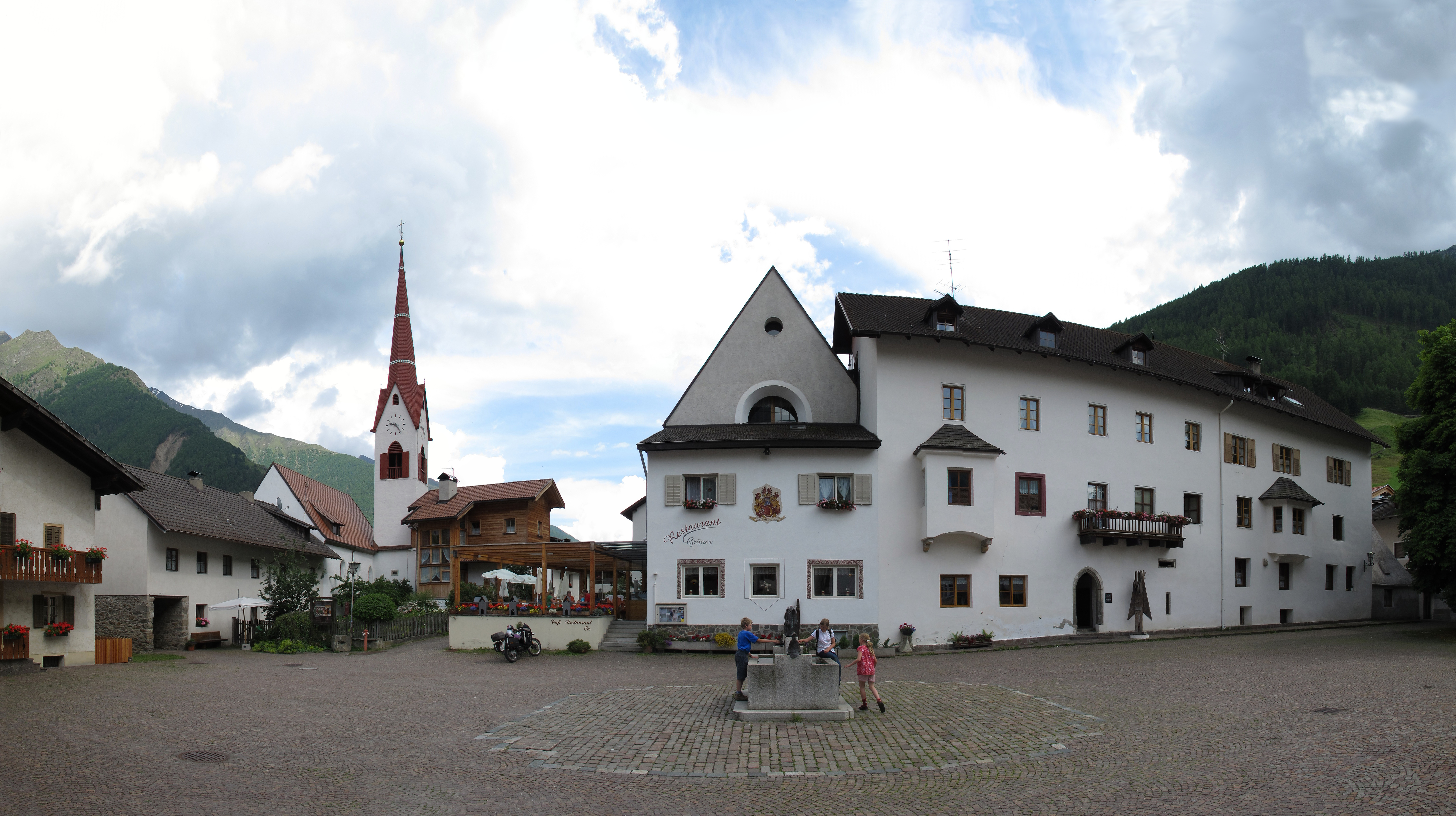 Karthaus im Schnalstal (Südtirol): Panorama des Hauptplatzes mit dem alten Priorat, der ehemaligen Klosterkirche und St. Anna (von rechts nach links)